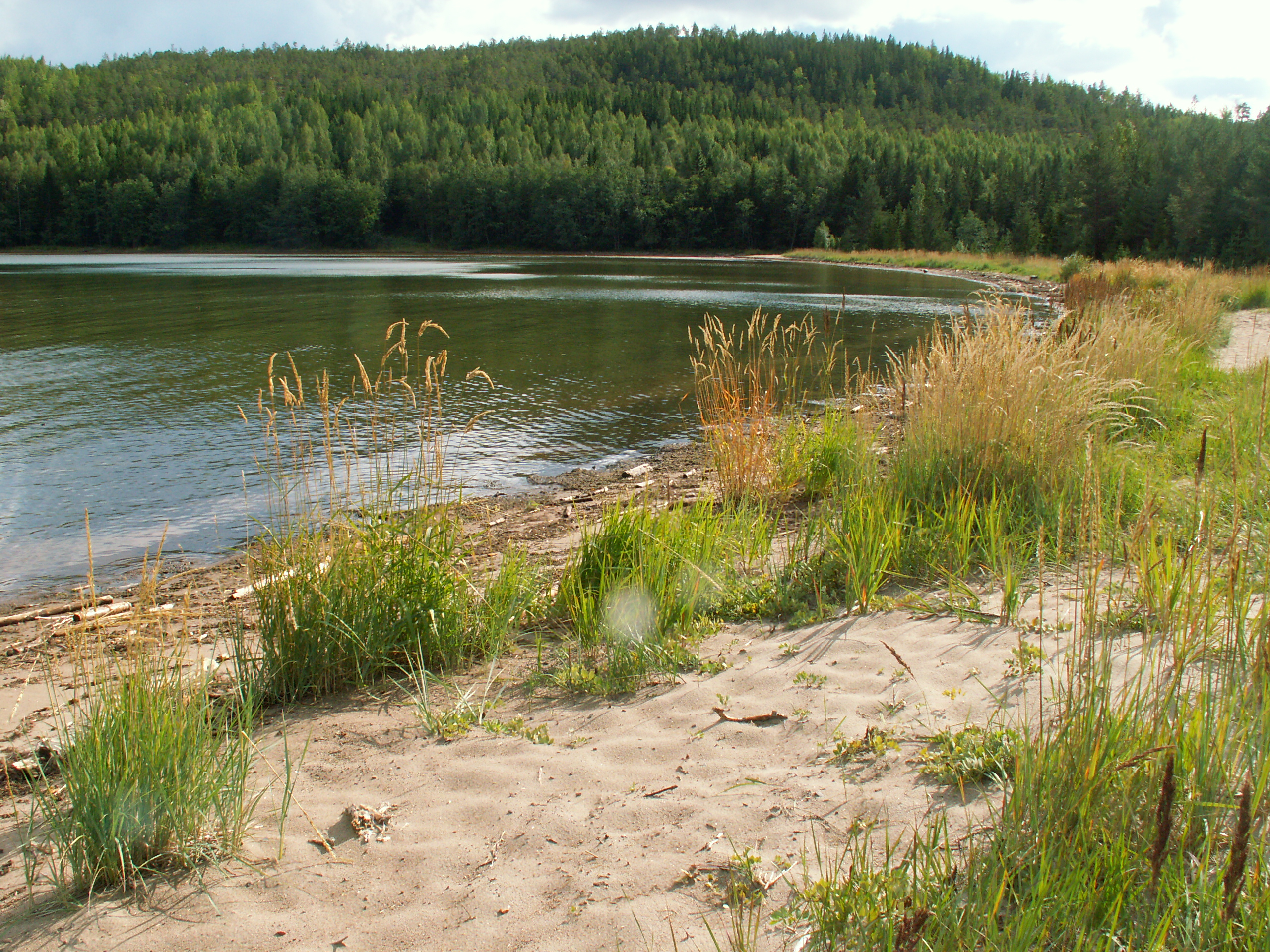 Beach in Skuleskogen national park